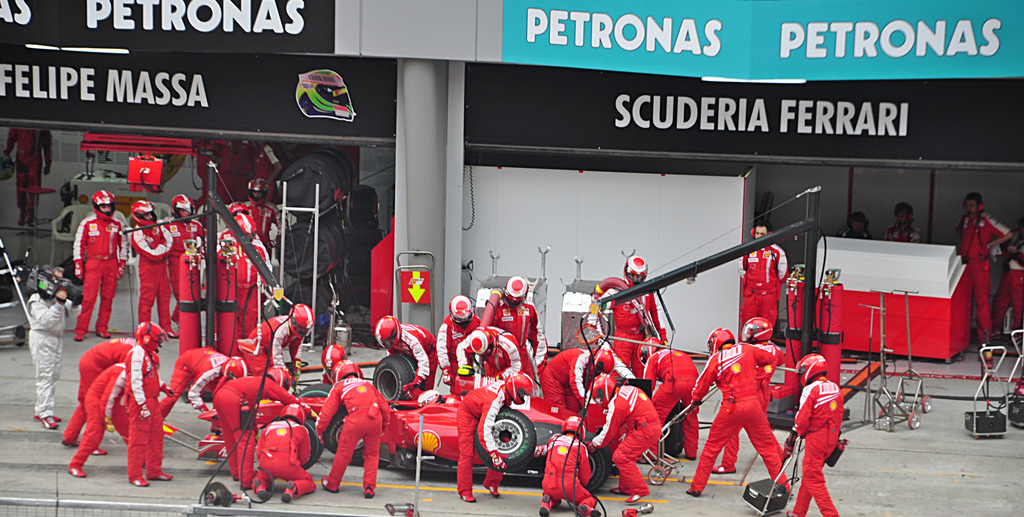 pit stop raikkonen au GP de Malaisie 2009